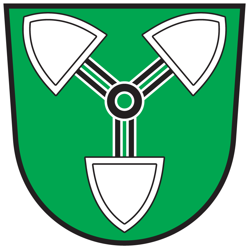 Wappen von Steuerberg